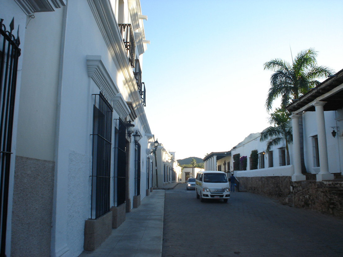 Calle del centro de Álamos, Sonora.